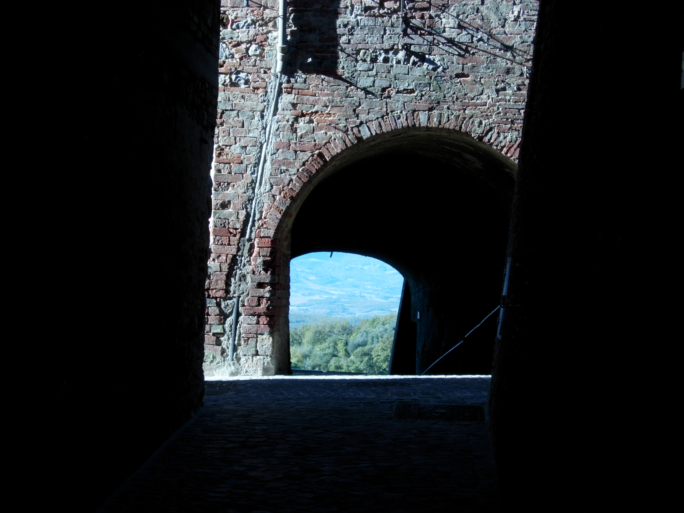 Angolo di Monteleone d'Orvieto: sullo sfondo la Valdichiana